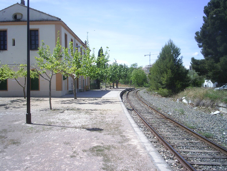 Estació adif Albaida